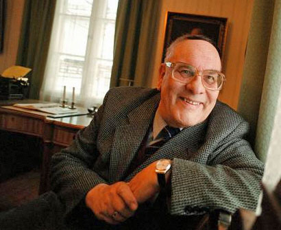 Ålands orgelfestivals ordförande 1974-1989